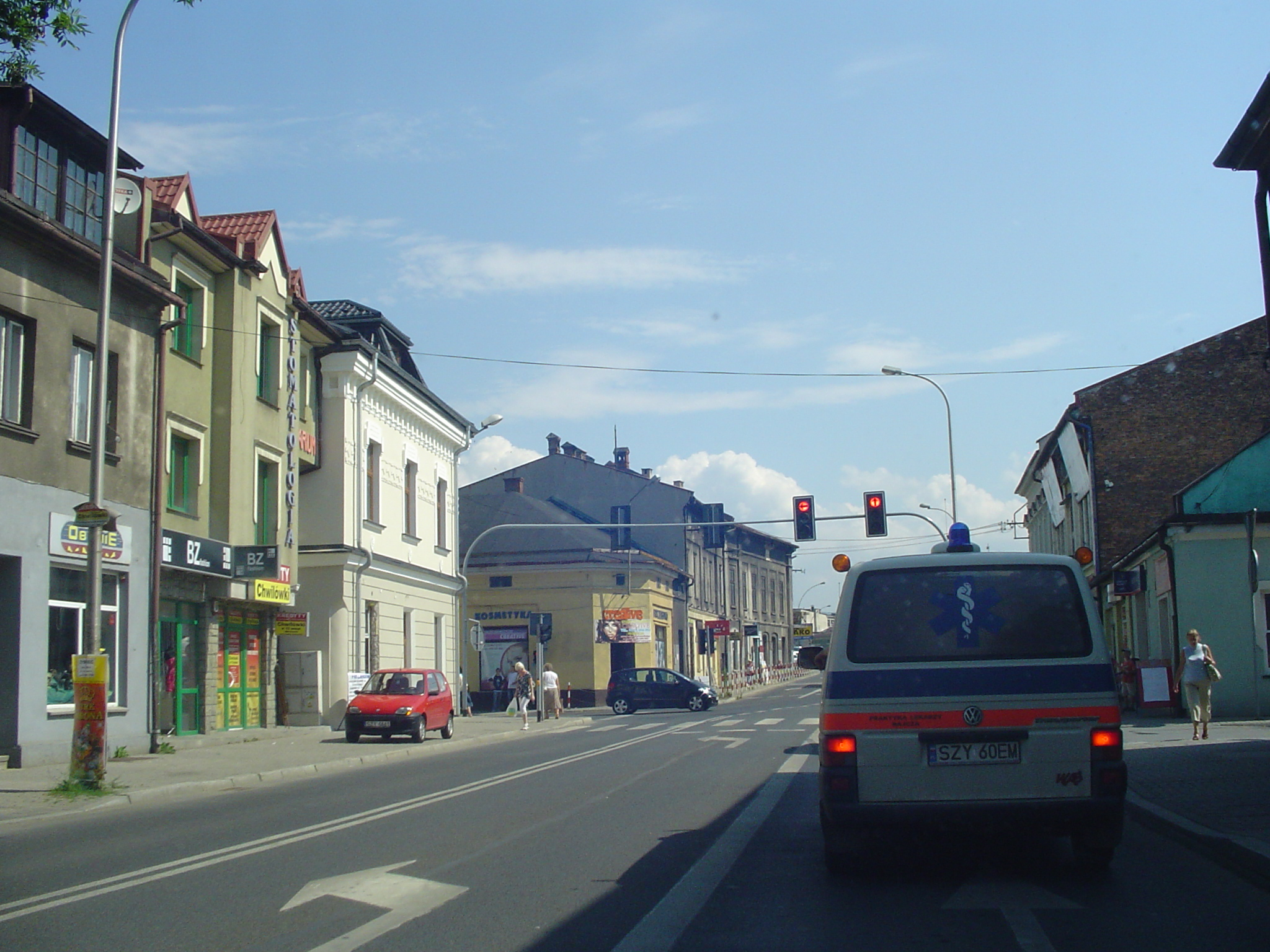 Ulica Dworcowa w Żywcu widziana w kierunku mostu na Sole